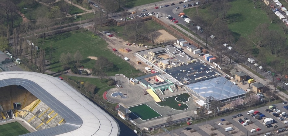 Luftbild vom Georg-Arnhold-Bad, Dresden (Ausschnitt)